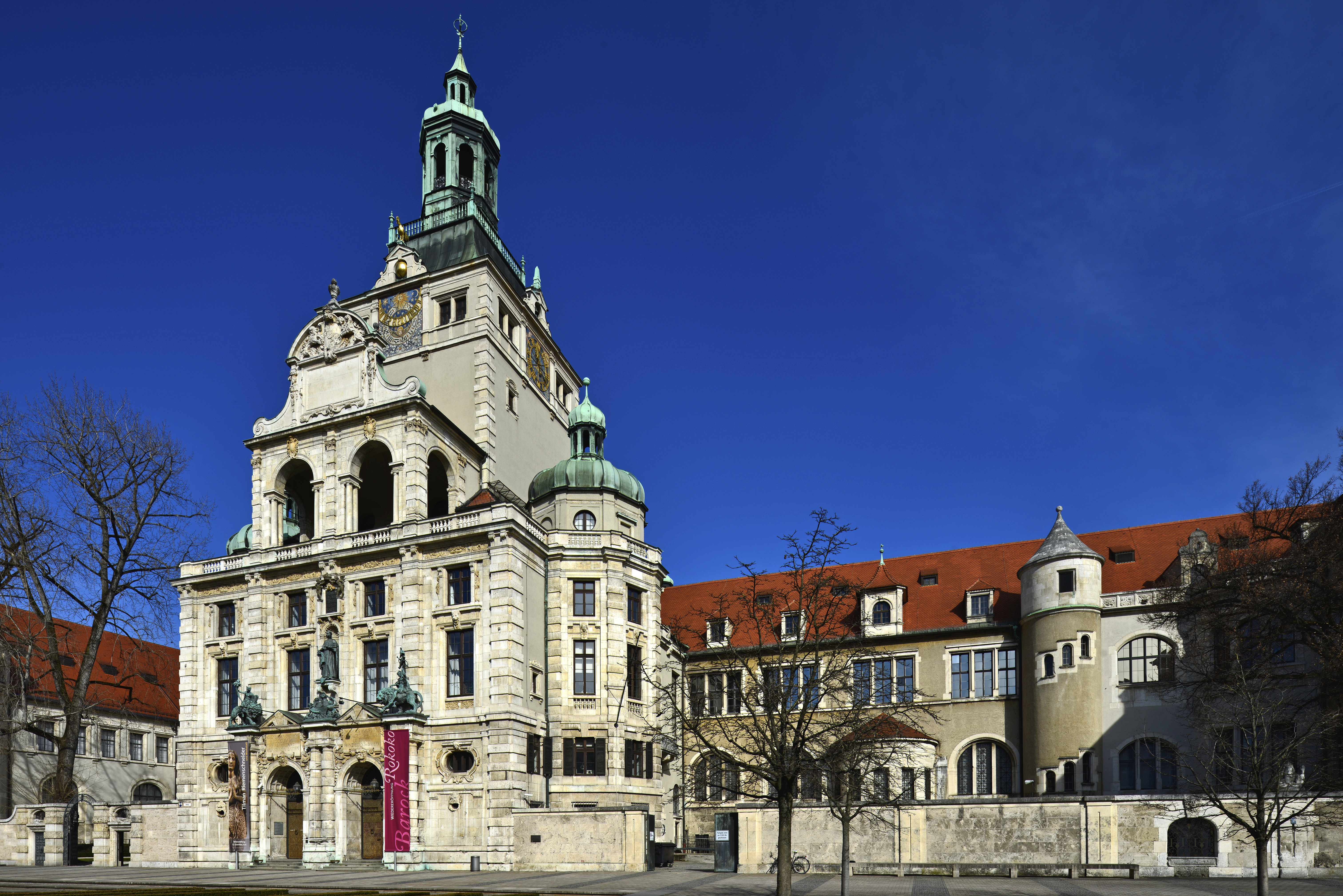 München, Fassadenteilansicht Prinzregentenstraße 3, Bayerisches Nationalmuseum Hauptbau.